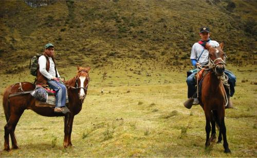 ganaderias